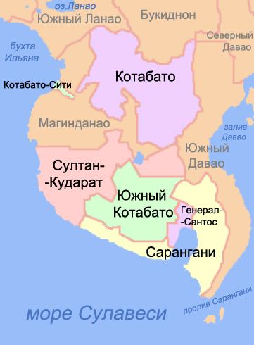 Карта провинций региона СОККСКСАРХЕН (Филиппины)